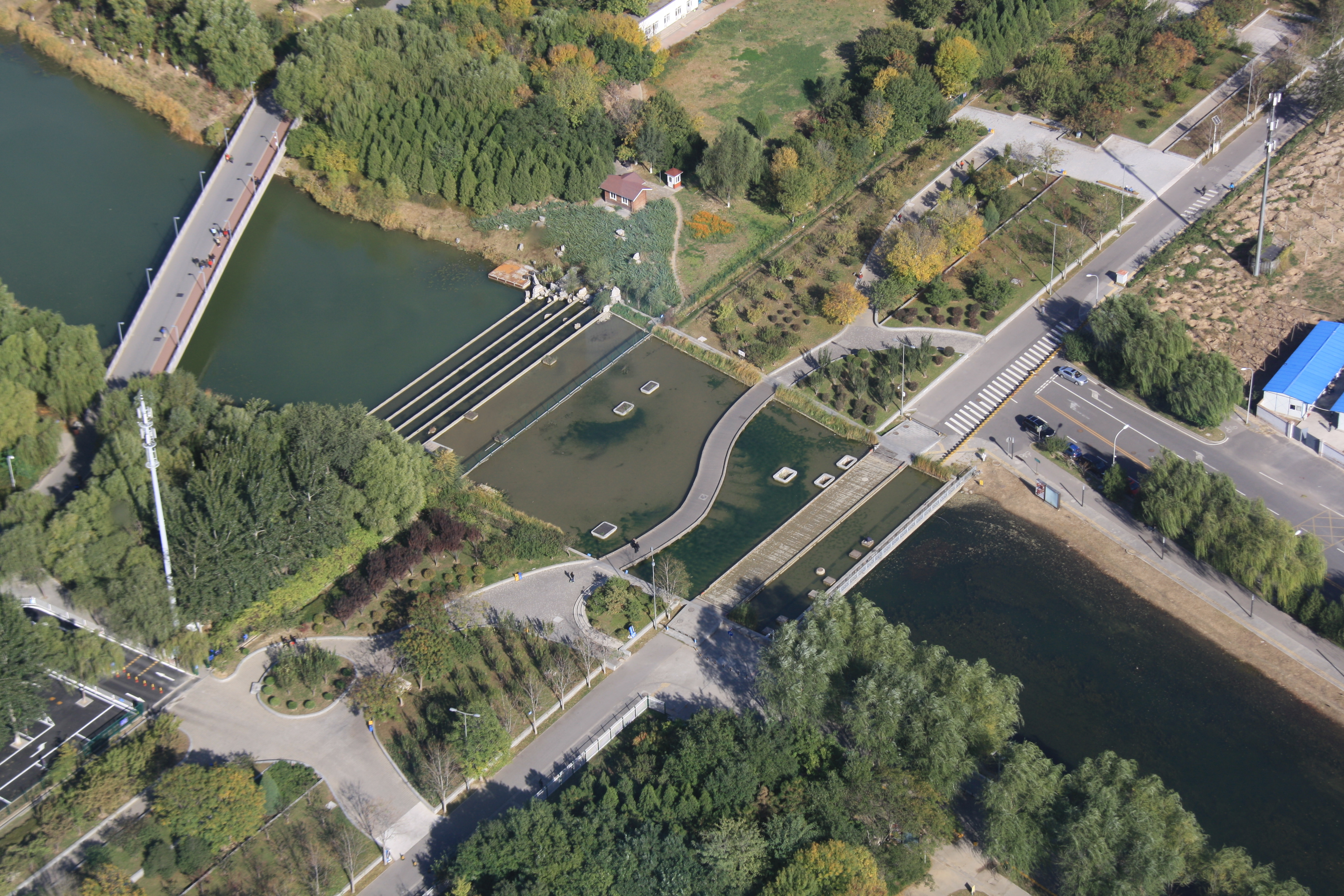 在北京奥林匹克塔上看到的科荟路与龙形水系交叉处，原有桥梁已被拆除